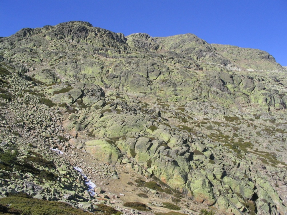 Cara sureste del pico de Peñalara, perteneciente a la Sierra de Guadarrama (España).